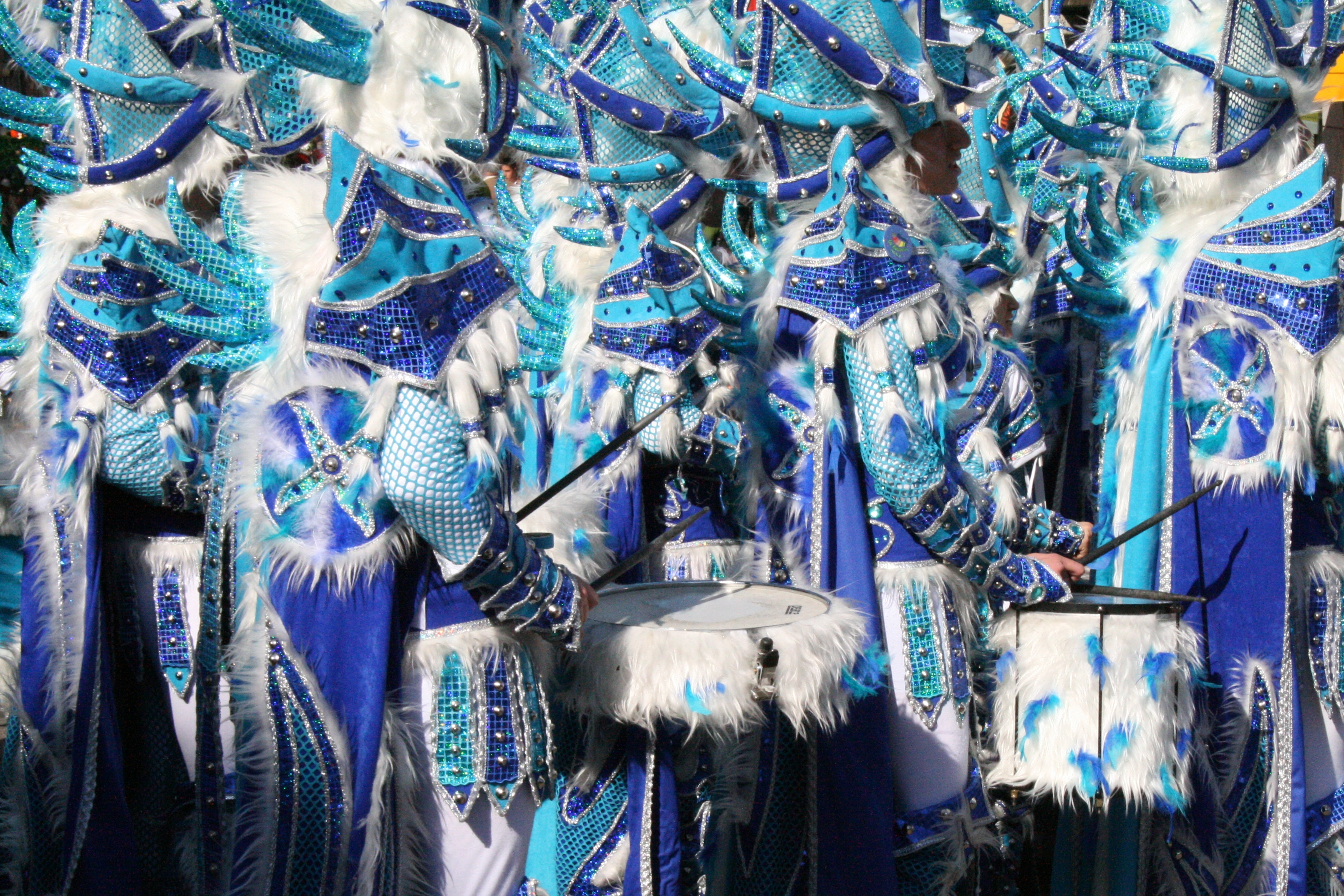 El increíble carnaval de Badajoz